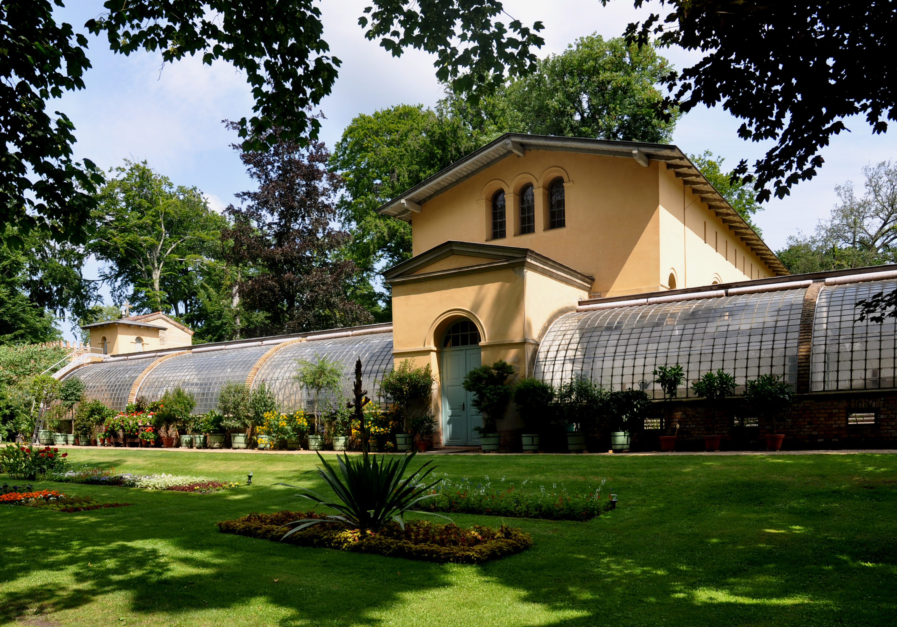 Die Gewächshäuser von Süden